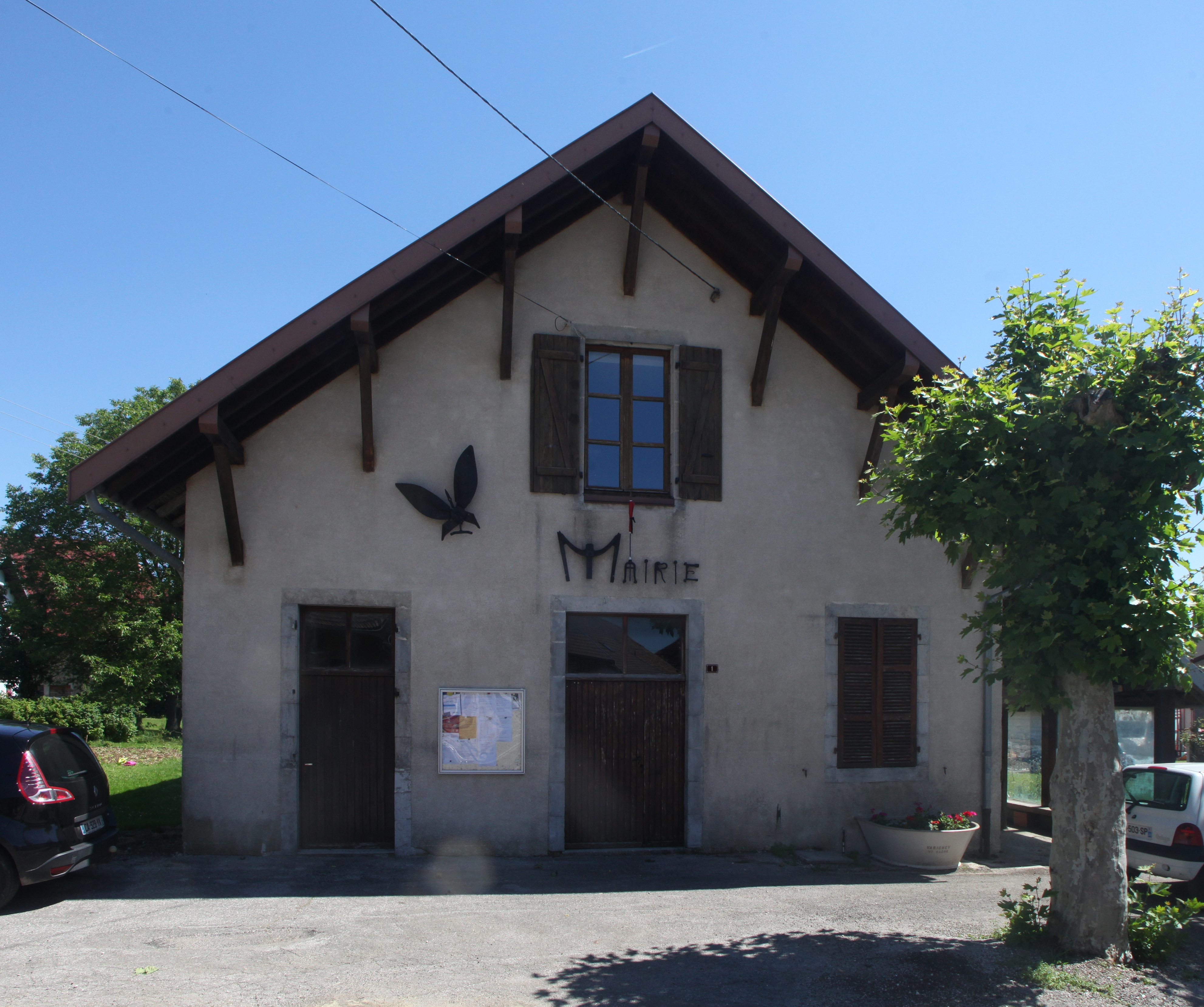 Mairie de Charency (Jura).